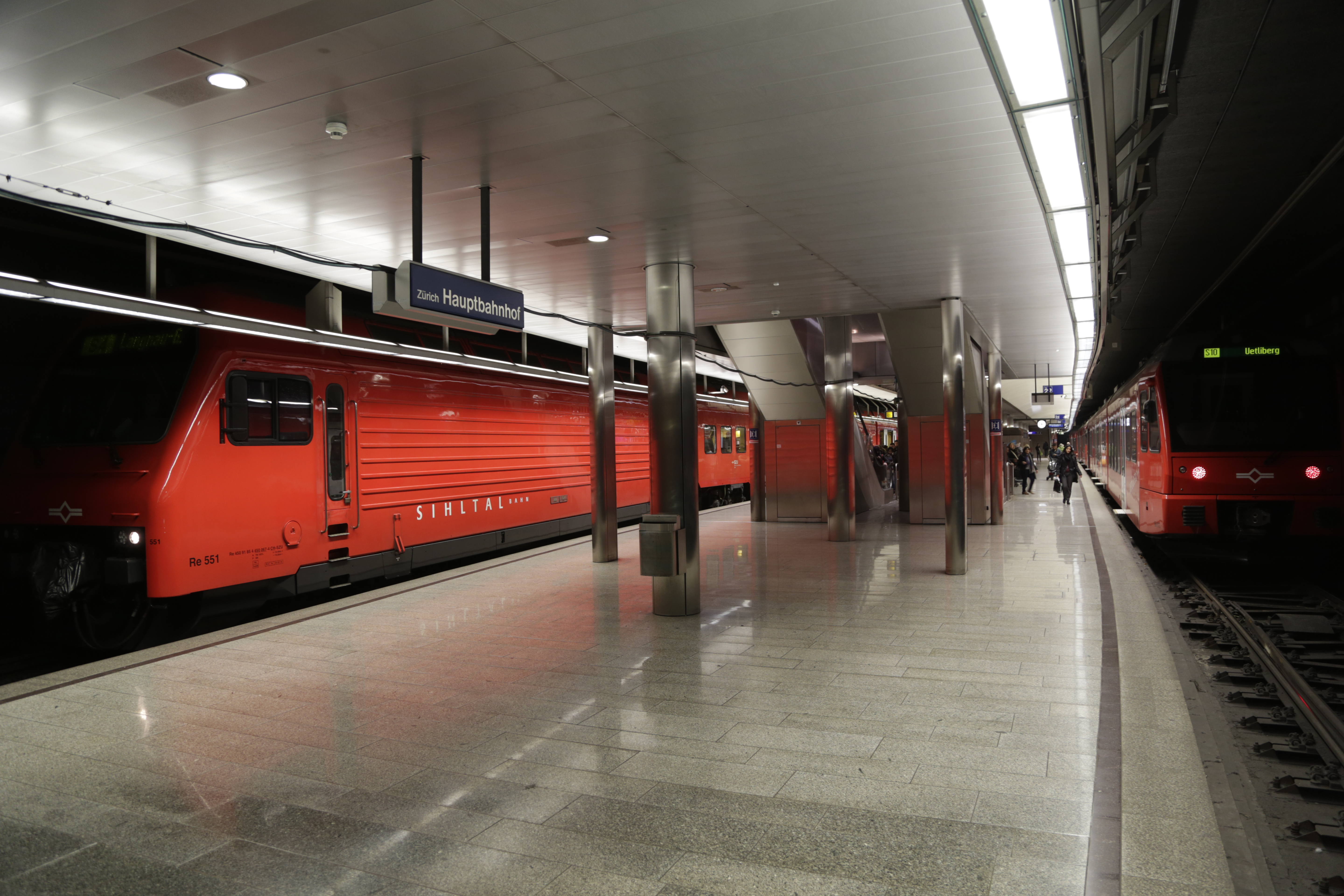 Impressionen aus dem SZU-Bahnhof